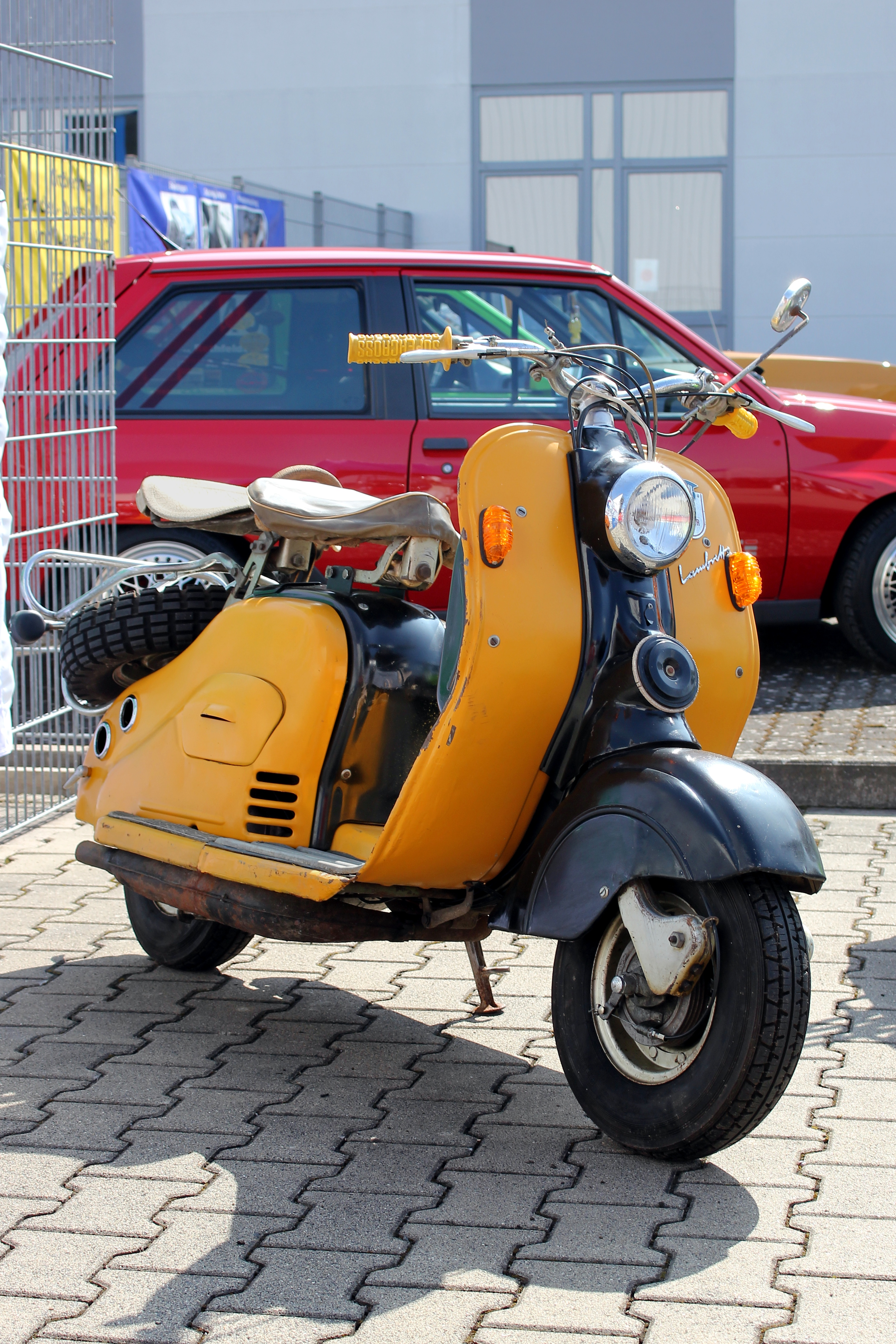 NSU Lambretta, Baujahr 1955 (sogenannter „Scheunenfund“, Lackierung und Blinker nicht original); Motor 149 cm³, 6 PS